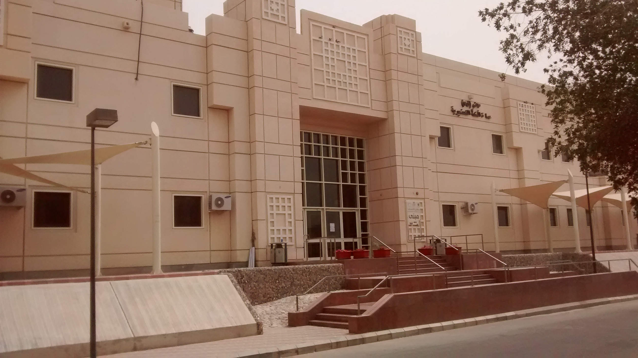 مبنى ق3 بعمادة السنة التحضيرية بجامعة أم القرى بمكةالمكرمة